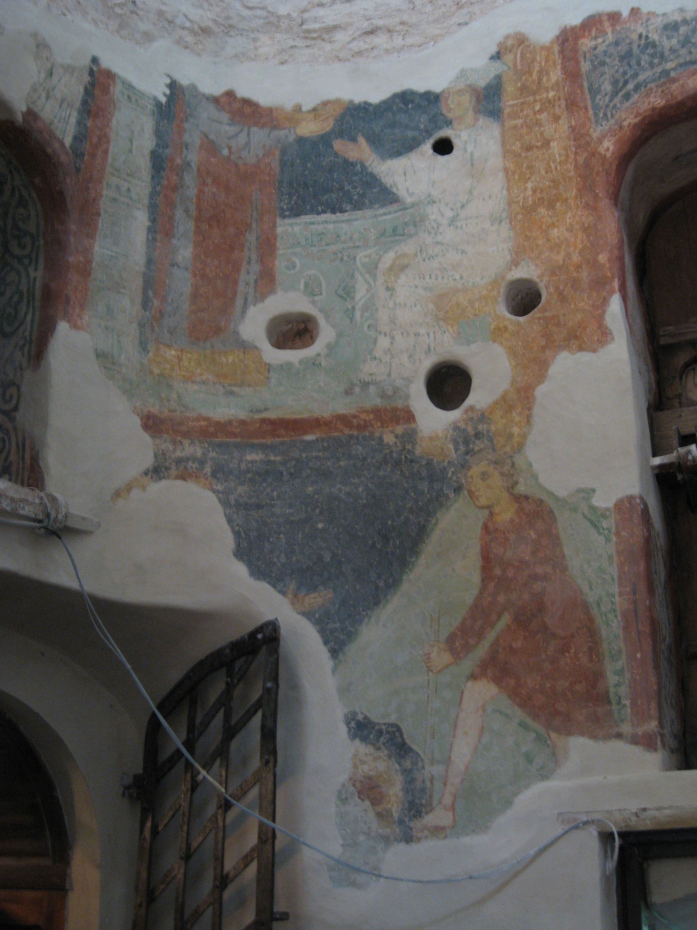 Фрески в диаконнике собора Антониева монастыря в Великом Новгороде.